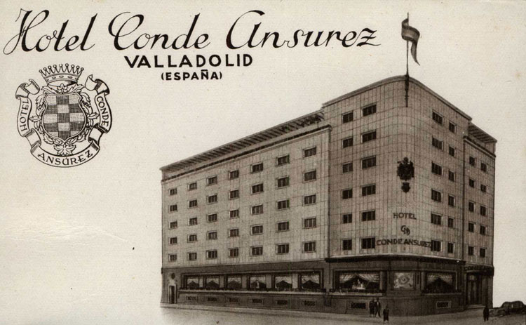 Hotel Conde Ansúrez - Valladolid - Tarjeta Postal - Huecograbado Fournier - Vitoria. Valladolid. Hotel Conde Ansúrez - Tarjeta postal. Papel 137 x 90 B/N